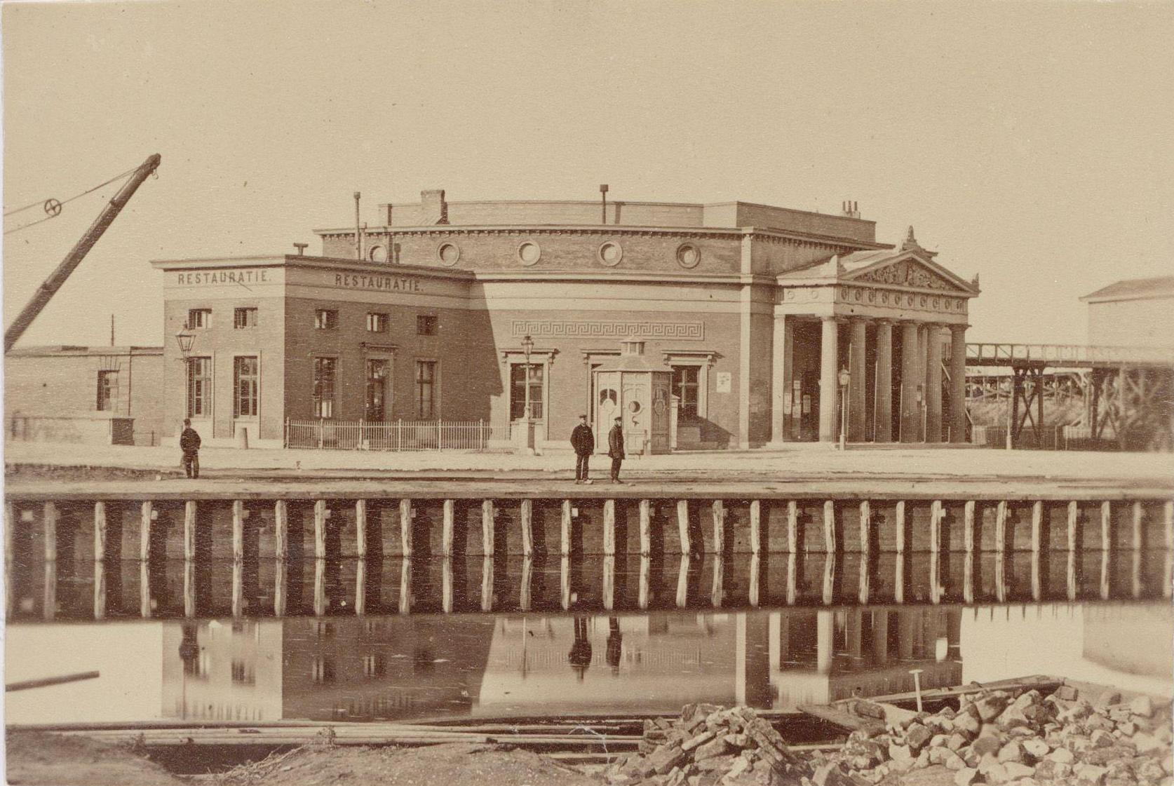 Station Willemspoort, Amsterdam. 1878. Foto. Afmetingen onbekend.